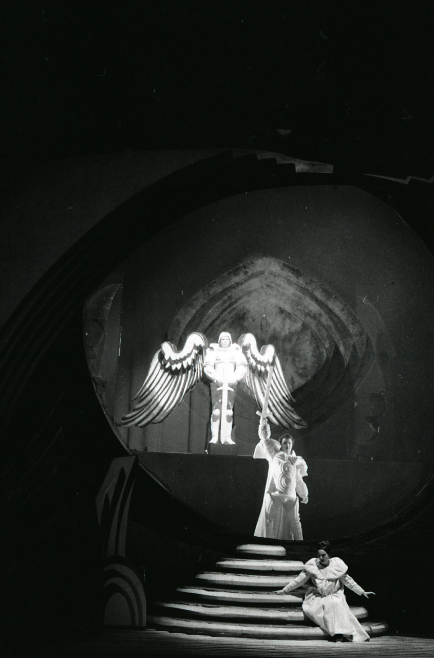 Teatro. Interni: Luciano De Vita, "L'angelo di fuoco", scenografia (e costumi) per l'opera lirica di Prokofiev; durante la rappresentazione teatrale? Servizio fotografico : Italia, 1973 / Paolo Monti. - Strisce: 7, Fotogrammi complessivi: 36 : Negativo b/n, gelatina bromuro d'argento/ pellicola ; 35 mm. - ((Sul portanegativi: N[I]K[MA]T Tri-x. - Il fotogramma n. 2 è leggermente tagliato nella prima metà. - Fonte: Agenda di Paolo Monti: Leica 1501-3000 Controllo numerazione (1950-1978), presso Archivio Paolo Monti